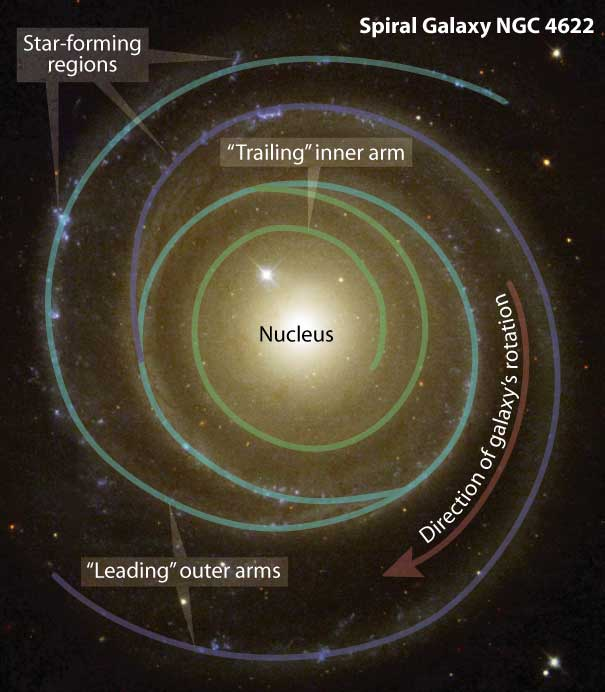 NGC 4622 Ilustration